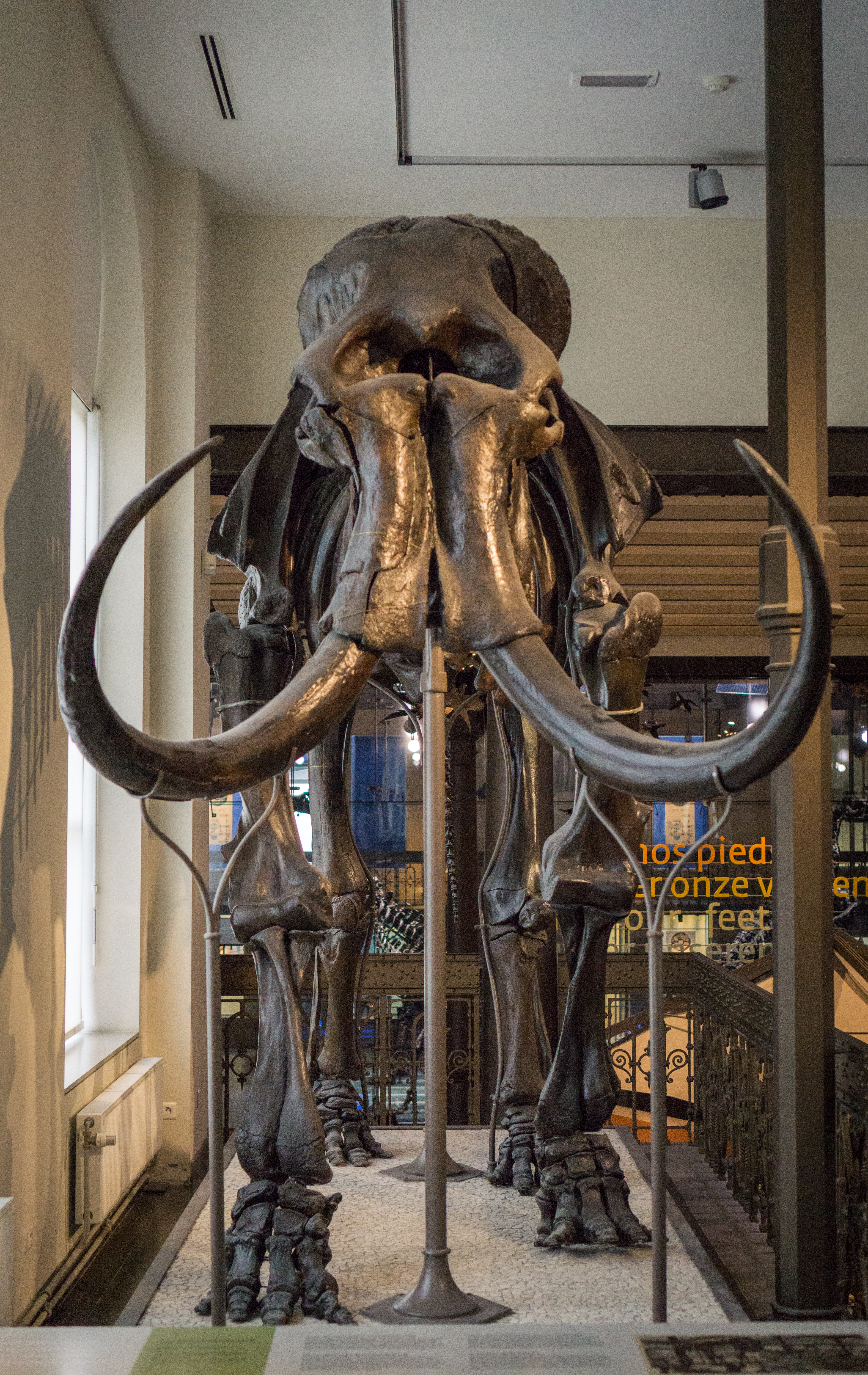 Squelette de mammouth du Muséum des sciences naturelles de Belgique This photo of movable heritage has been taken in the Brussels Capital Region